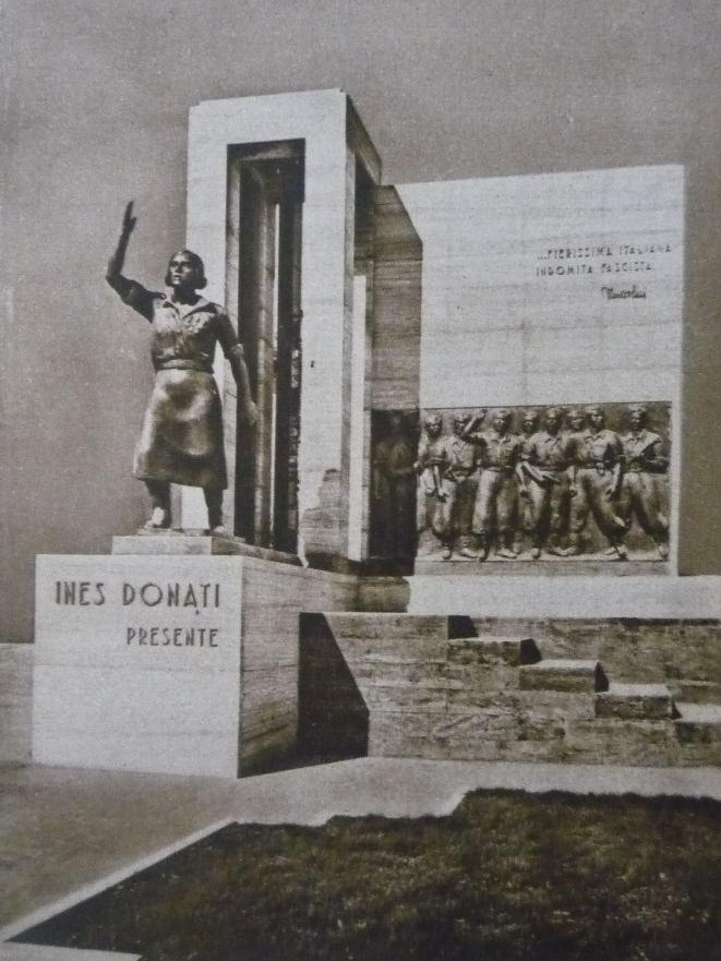 Il monumento riporta "Fierissima italiana indomita fascista"